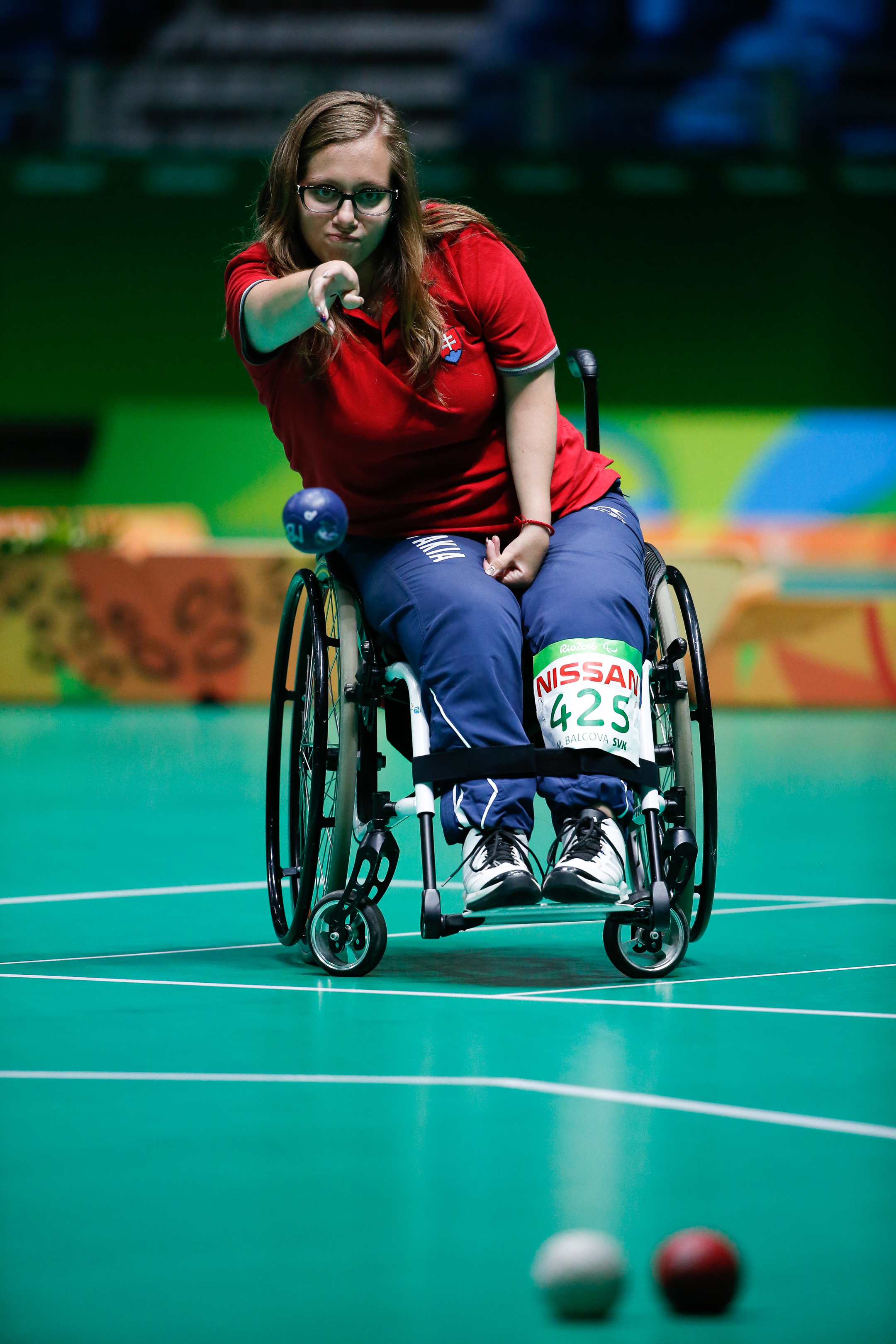 Rio de Janeiro - Brasileiros ficam com medalha de prata após derrota para Eslováquia na final da bocha BC4 nos Jogos Paralímpicos Rio 2016 (Fernando Frazão/Agência Brasil)